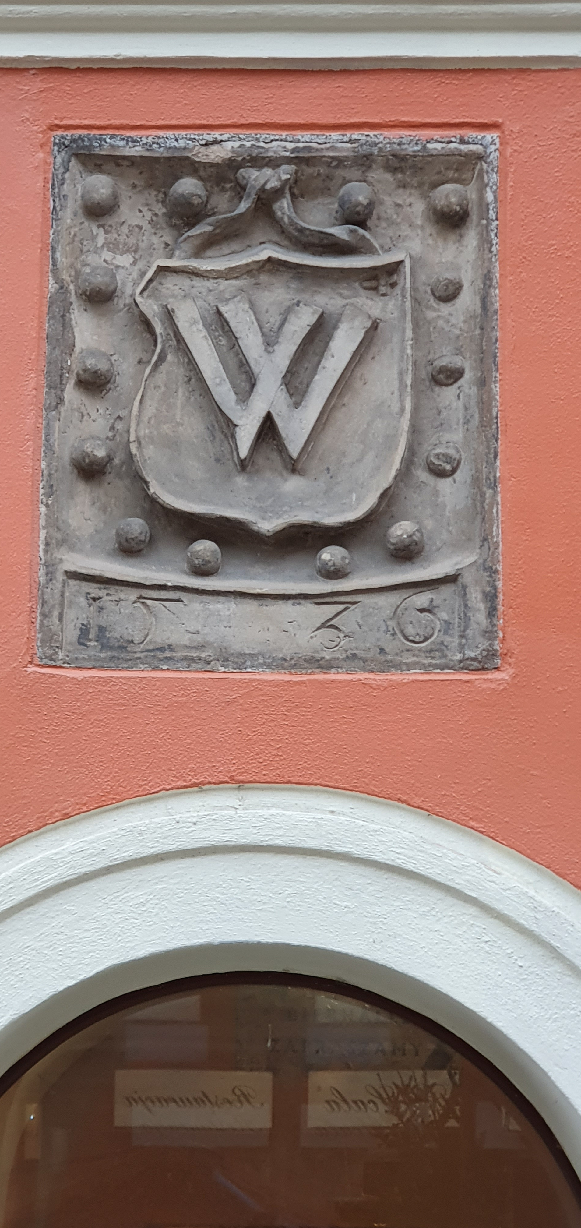 Kamienica Pod Zimnym Kamieniem we Wrocławiu, detal herb Wrocławia nad wejściem